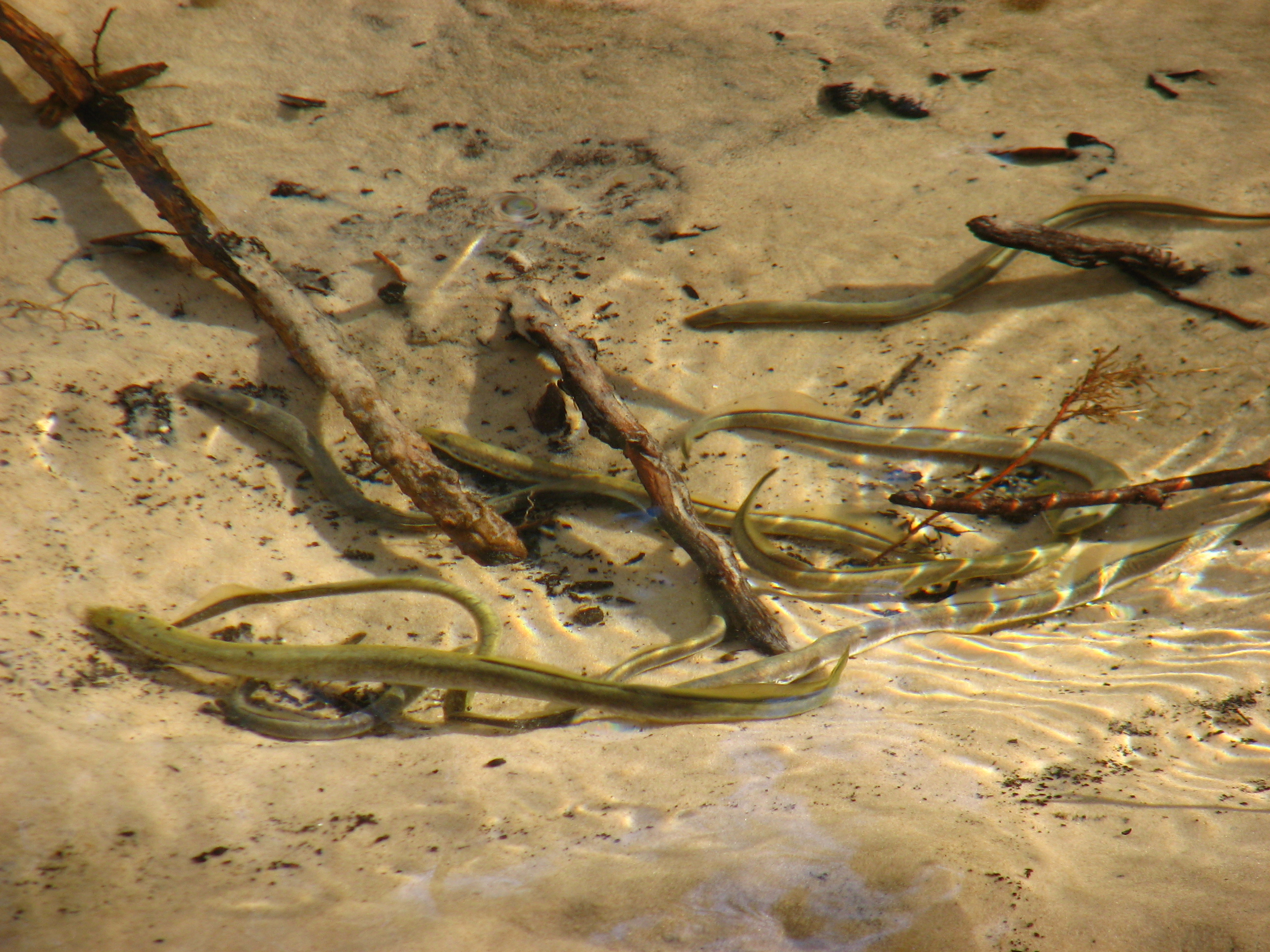 Міноги українські (Eudontomyzon mariae) у нерестовій ямі, національний парк "Святі Гори"